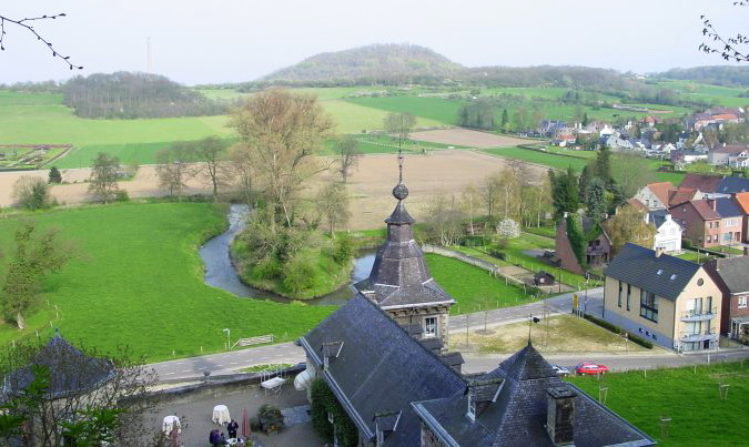 boucle du Geer à Kanne, à hauteur du château Neercanne